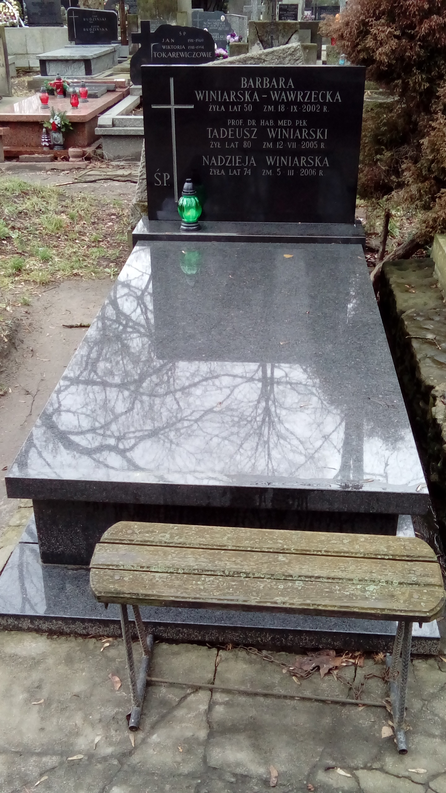 Grób Barbary Winiarskiej-Wawrzeckiej na Cmentarzu Powązkowskim